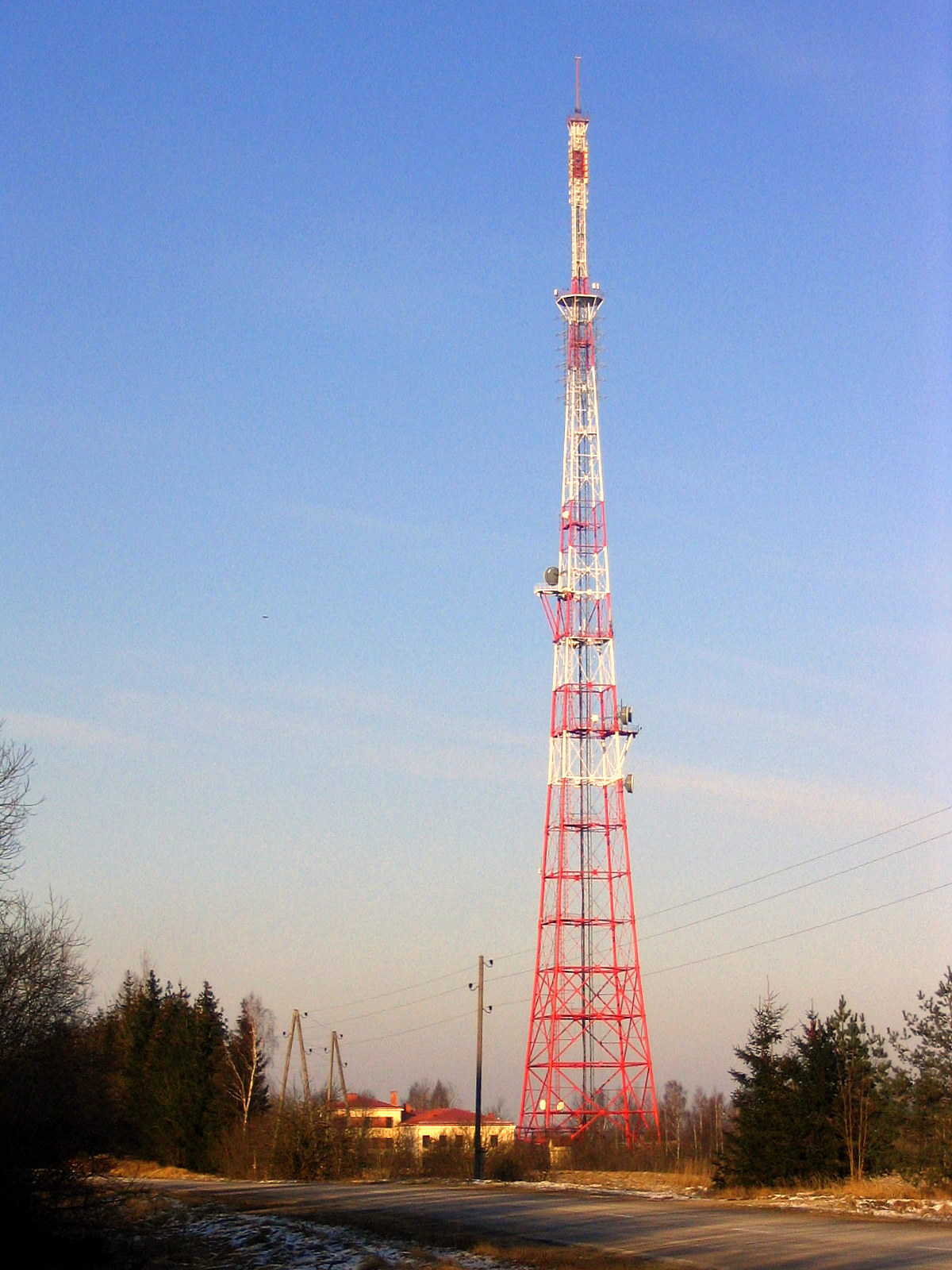 Kuldīgas TV un radio tornis